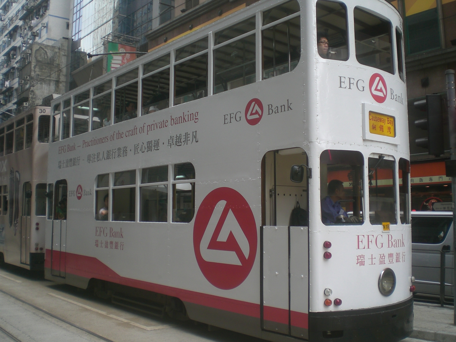 灣仔電車車身en:EFG Bank European Financial Group